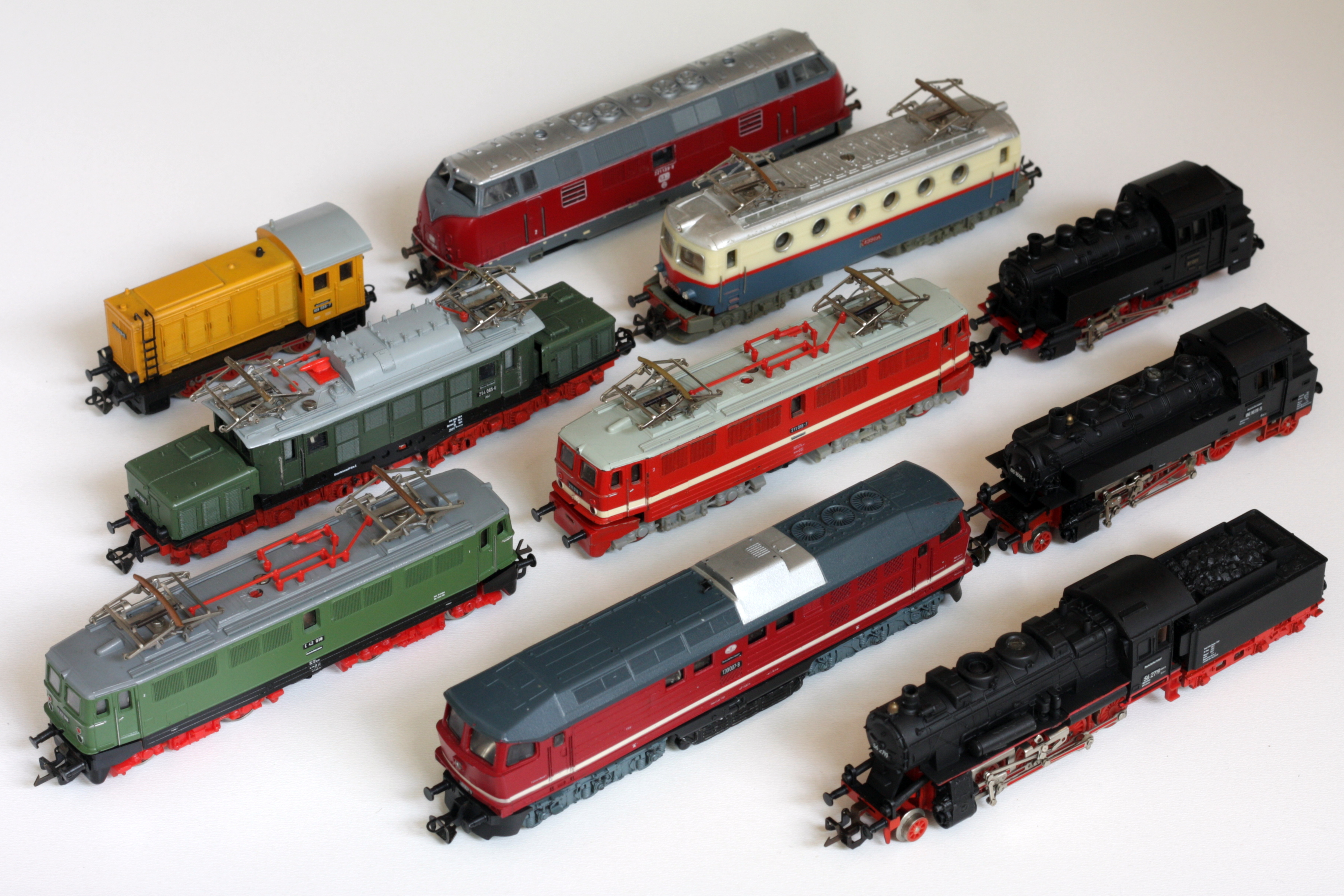 Lokomotiven im Maßstab 1:120 Spur TT aus der Zeit der DDR, überwiegend Hergestellt von Zeuke & Wegwerth bzw. VEB Berliner TT-Bahnen (BTTB) aus Berlin.